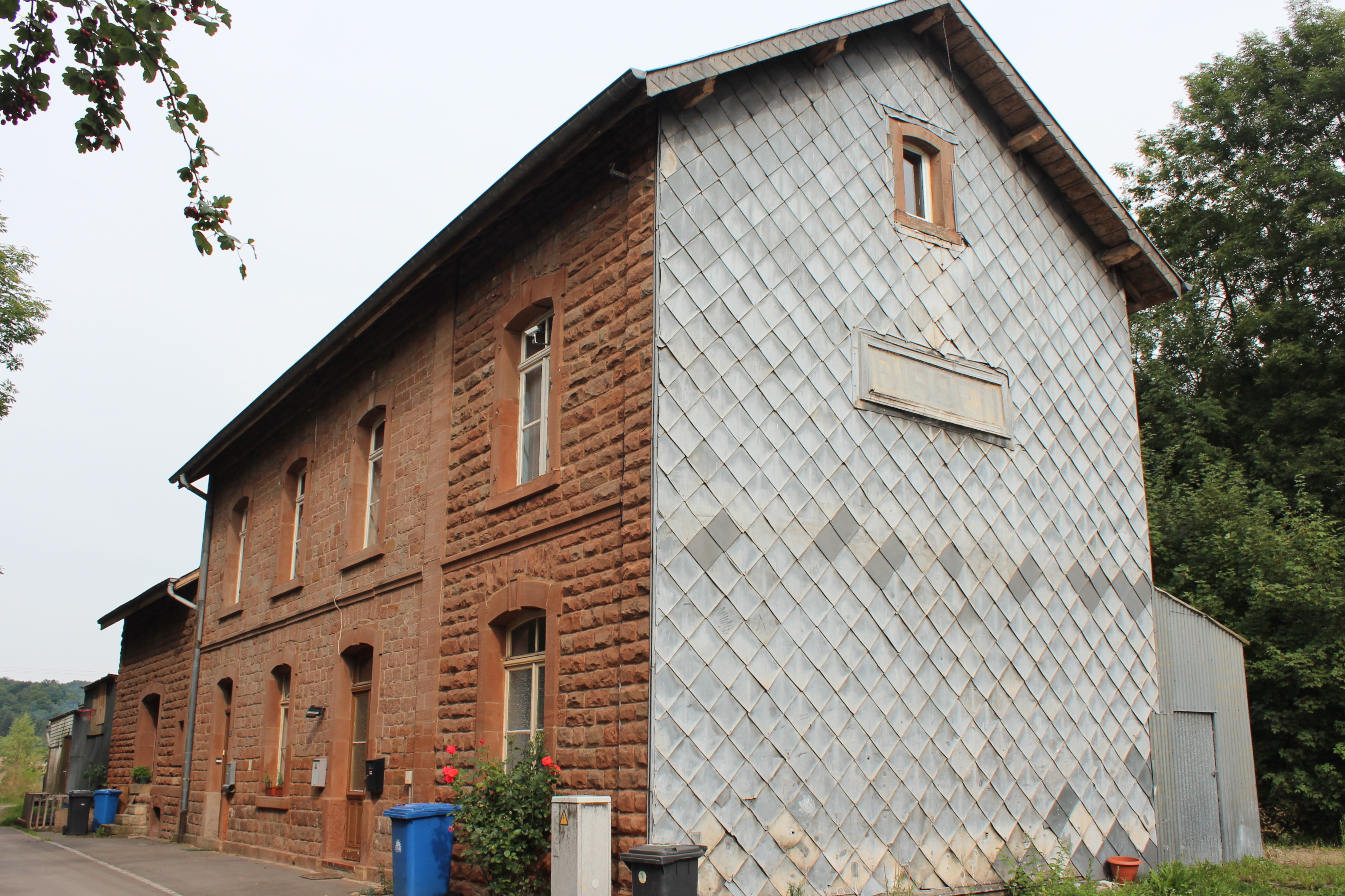 Déi fréier Gare vu Biissen; gouf den 2 Dezember 2011 als nationaalt Monument klasséiert.